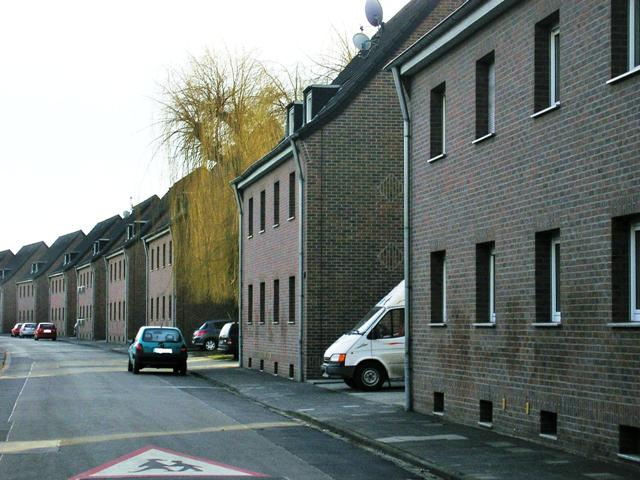 Frickestraße in Niederaußem mit Bergarbeiterhäusern.